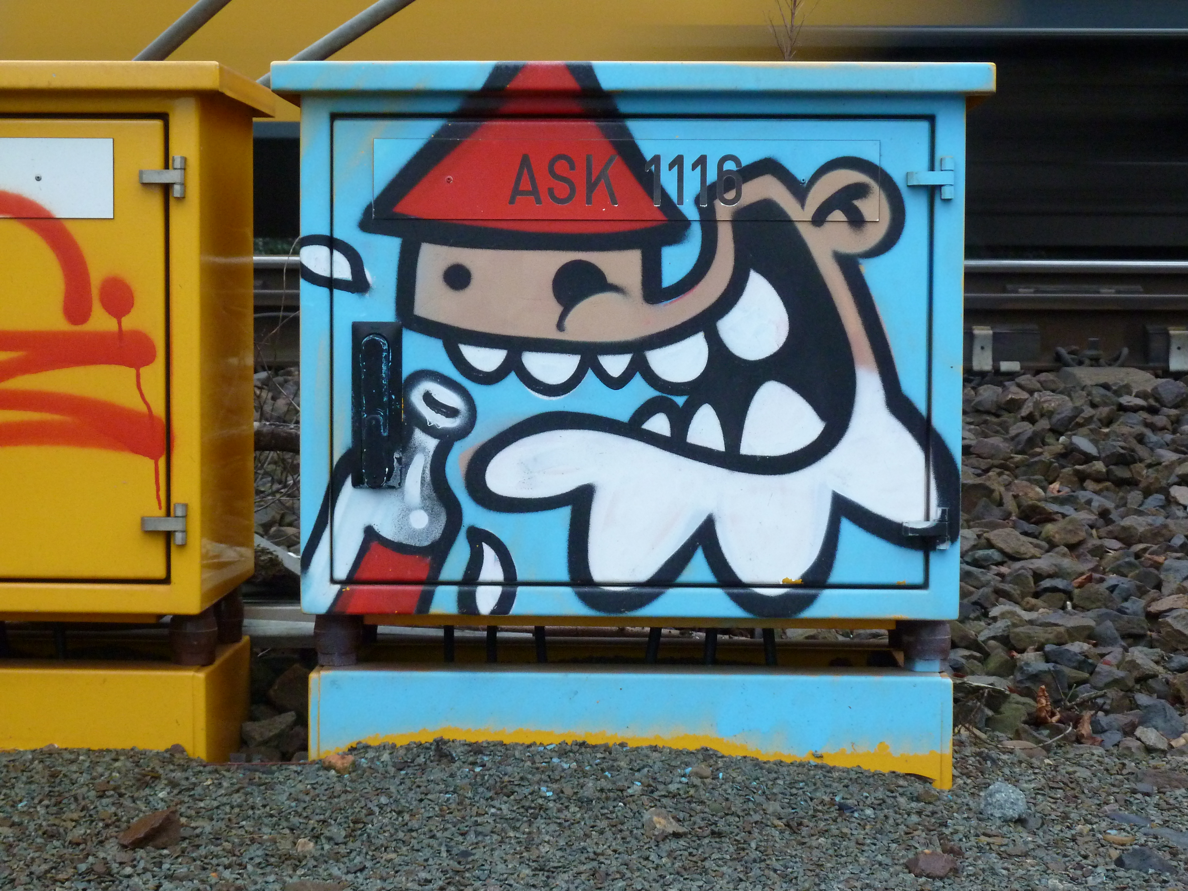 Graffiti Utrechtse kabouter, Noordsepark spoorlijn, parkzijde